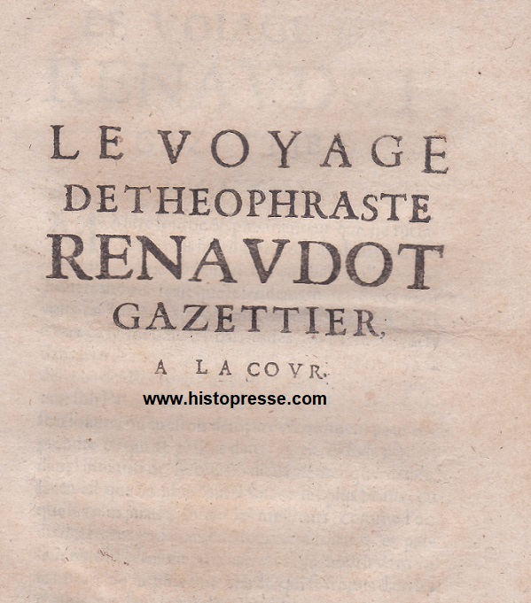 Cette photo représente une rare Mazarinade contre Théophraste Reanaudot, journaliste au service du Roi et de Mazarin, 1649.